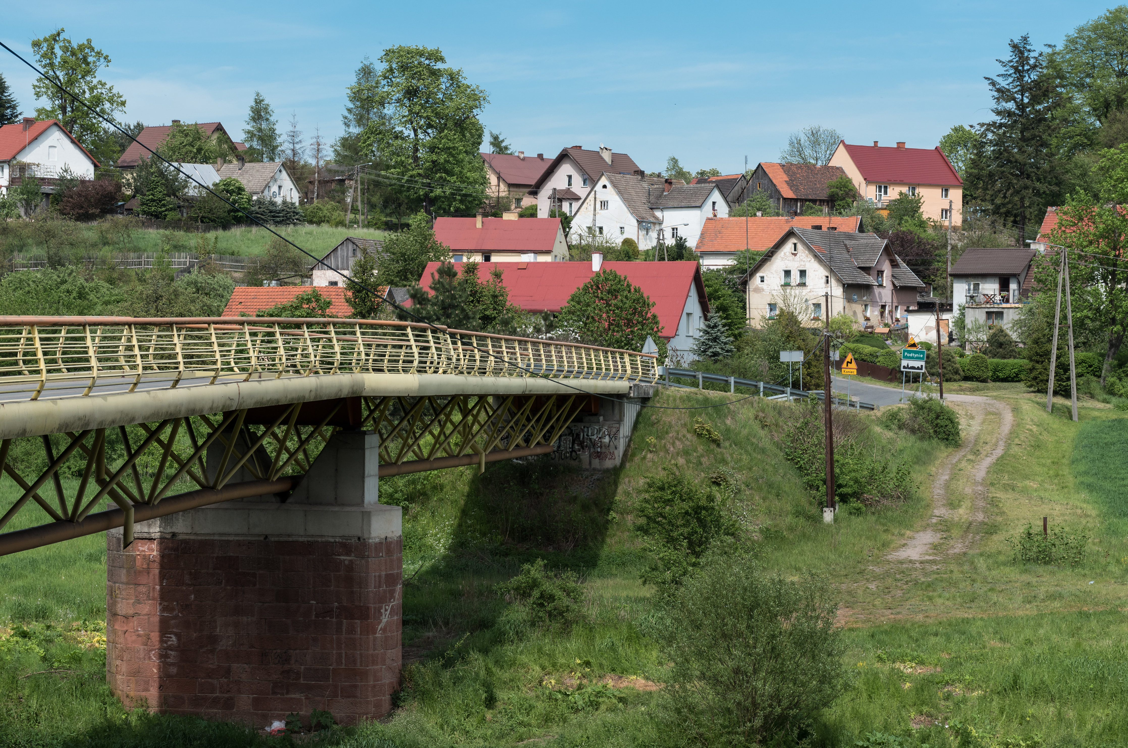 Podtynie